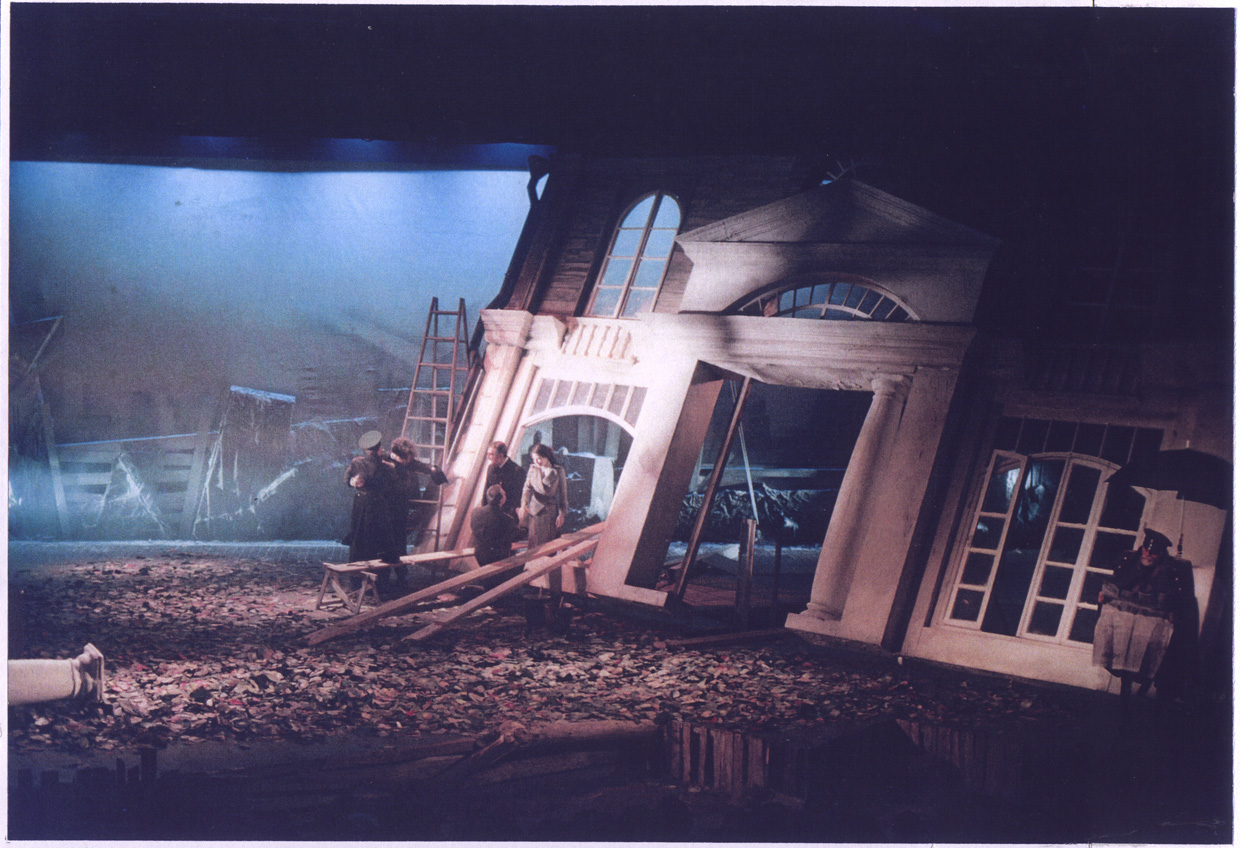 ההצגה שלוש אחיות, תיאטרון גשר